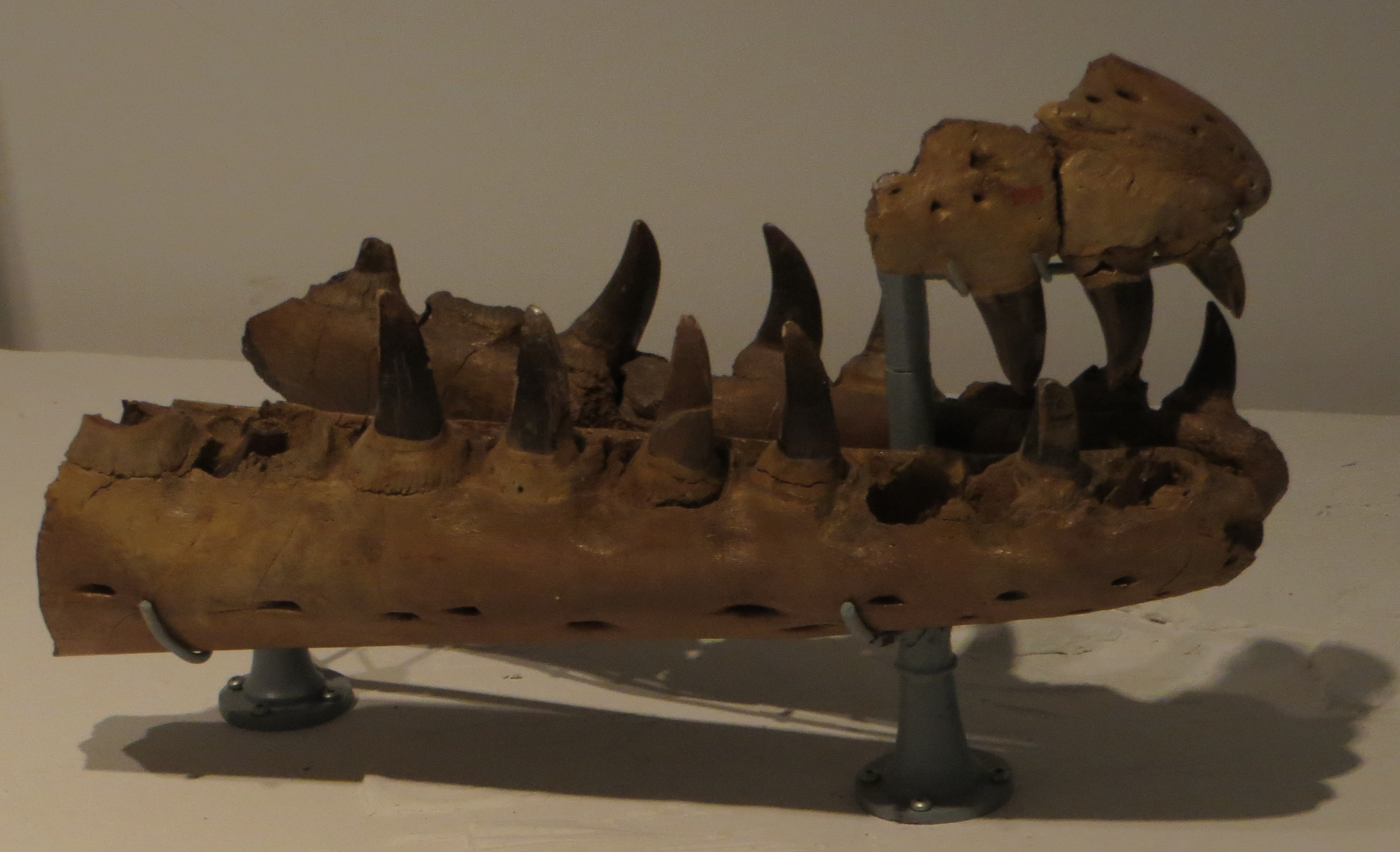 Fossil - Took The picture at Royal Belgian Institute of Natural Sciences, Brussels